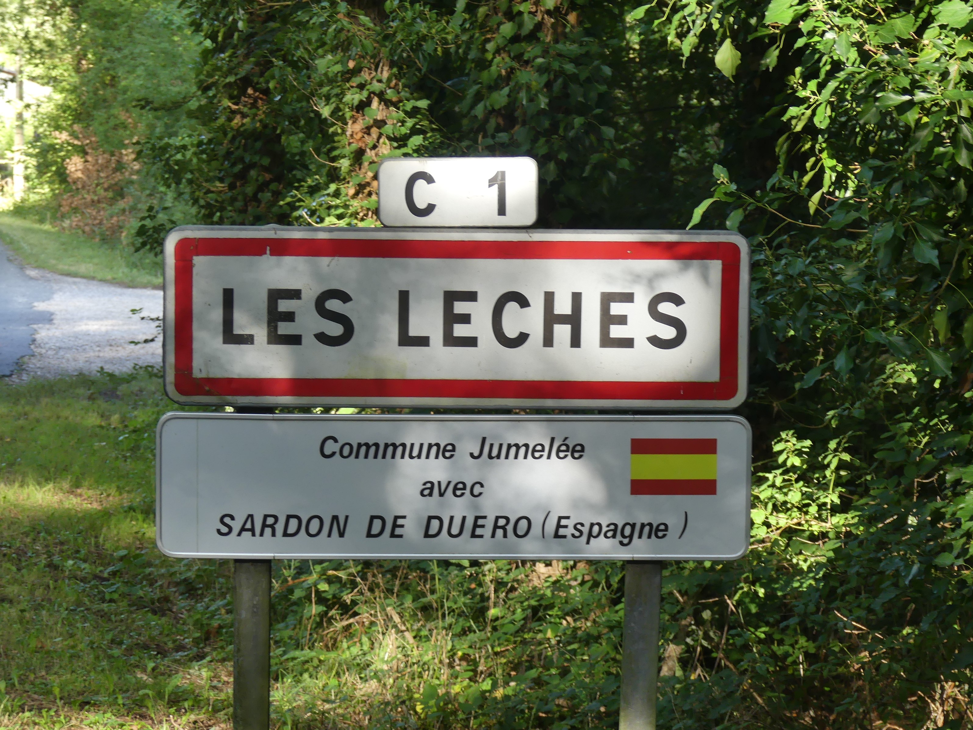 Panneau de jumelage des Lèches, Dordogne, France.